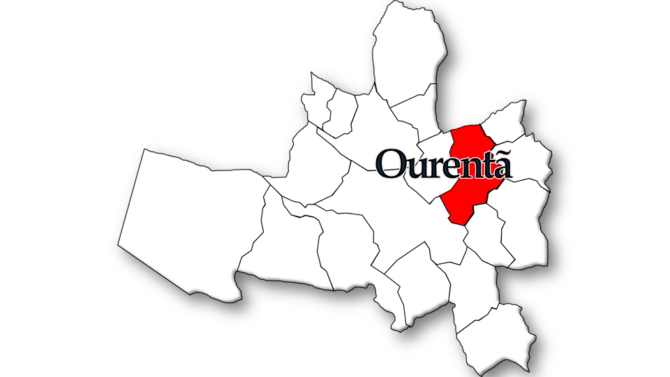 Português